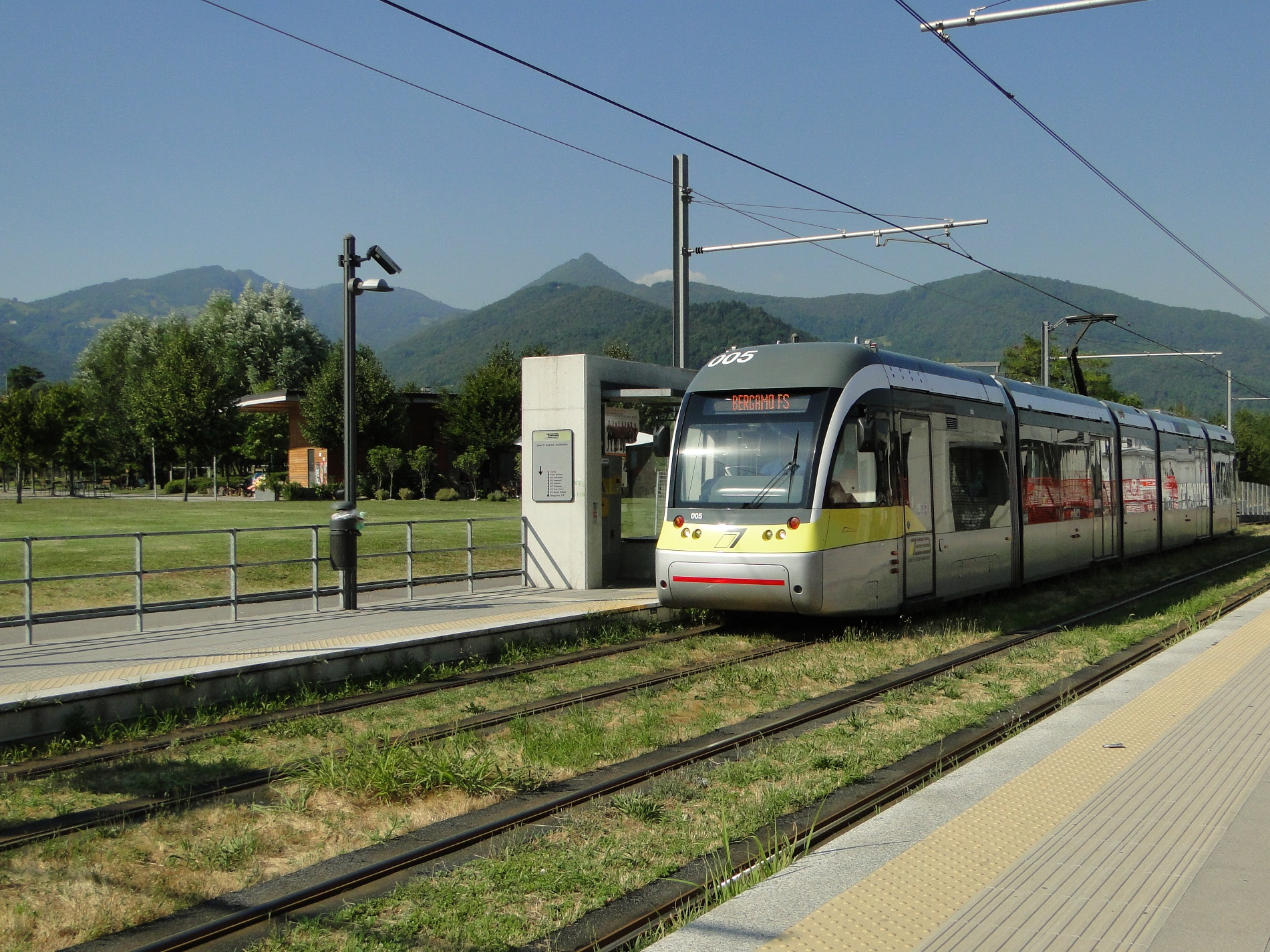 Fermata del tram Bergamo-Albino a Ranica